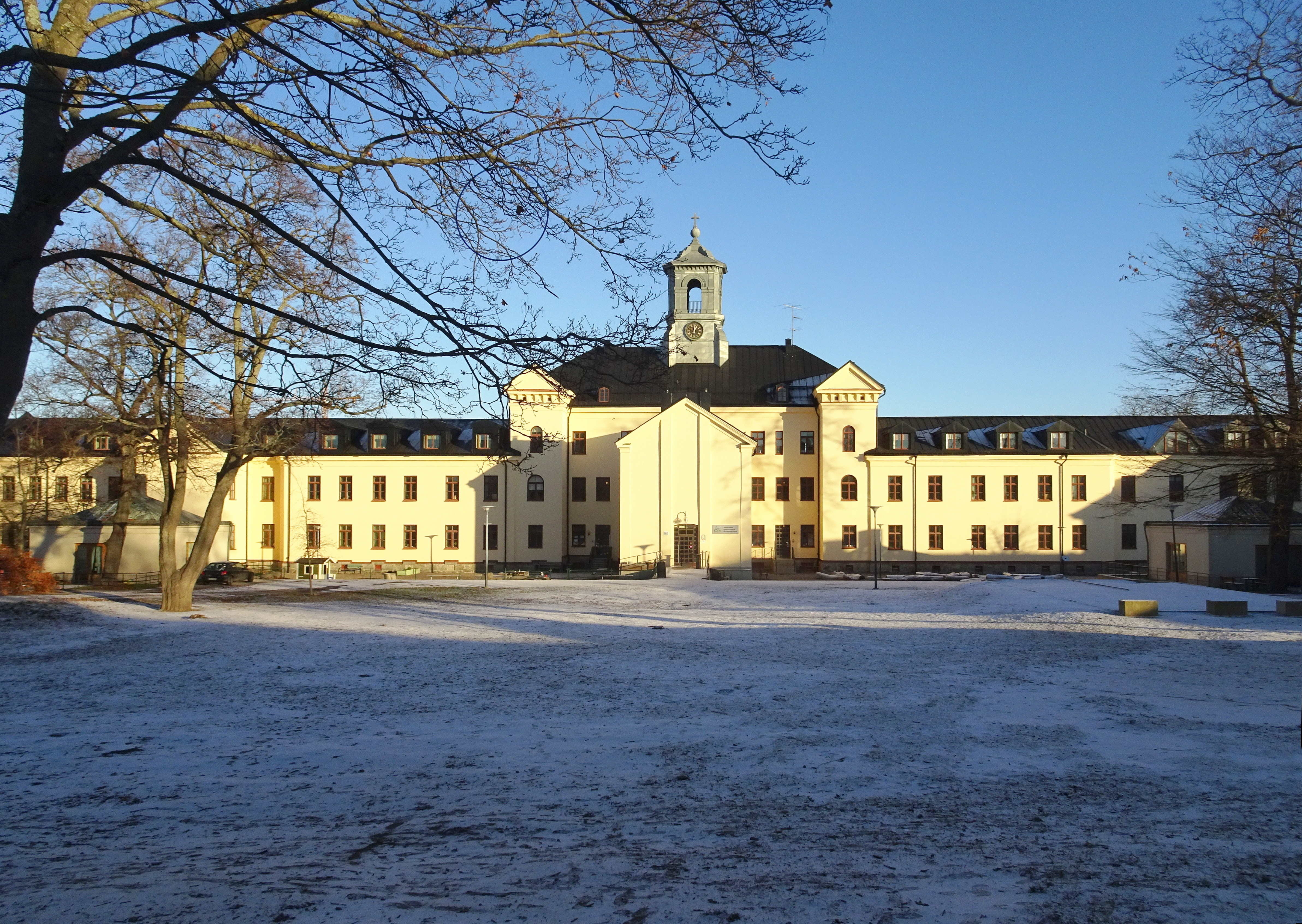 Konradsberg, Kungsholmen, Stockholm